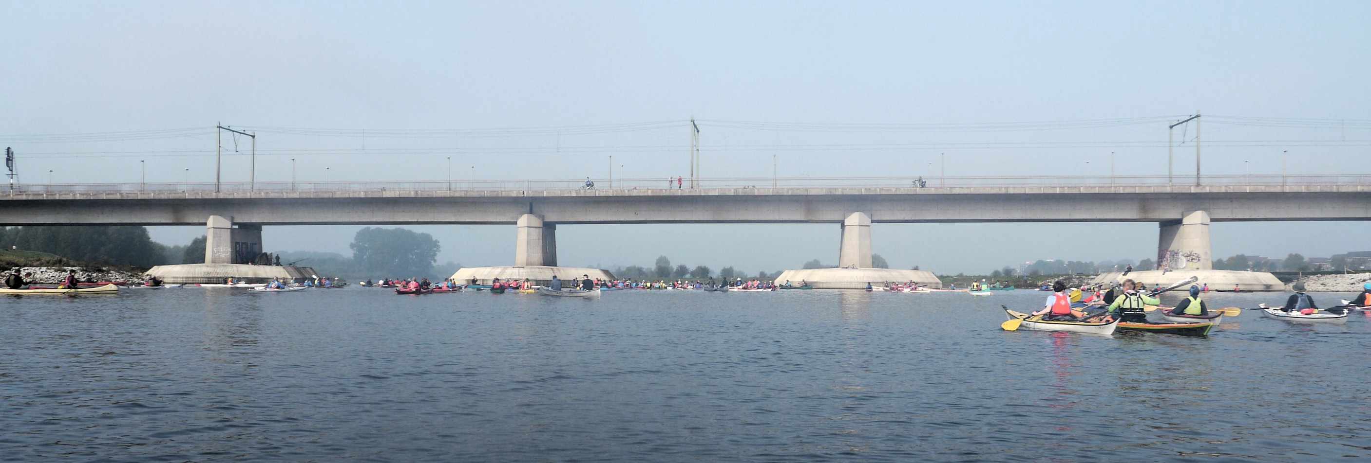 Vertrek van de Veluwerally op 24 september 2017, in Deventer.